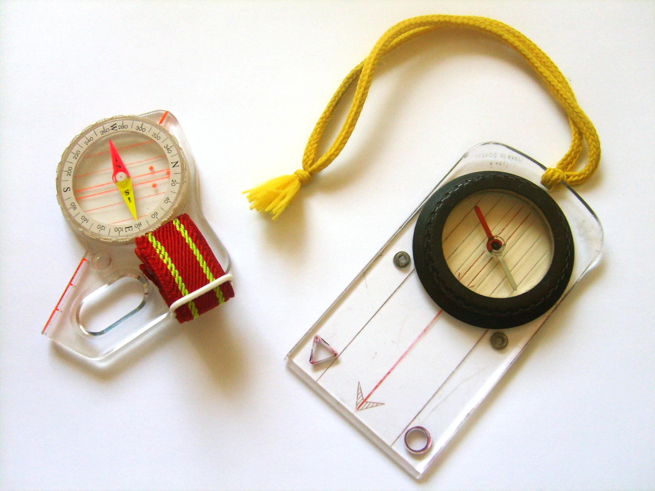 Compasses